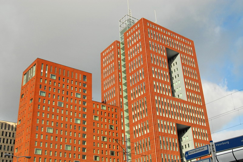 Op de hoek van de Prinses Beatrixlaan en de Schenkkade staat het landmark van het vernieuwde Beatrixkwartier. In negen aan elkaar geschakelde torens komen wonen, werken en vrijetijdsbesteding samen. Het complex bevat 60.000 m2 kantoorruimte, een horecaplein, 1.000 parkeerplaatsen, een viersterren-hotel, 2.000 m2 fitness, winkels, kinderopvang en 207 luxe huurappartementen. Het complex ligt rechts naast de Utrechtsebaan (A12 Utrecht-den Haag). Het Prinsenhof is opgeleverd in 2006.